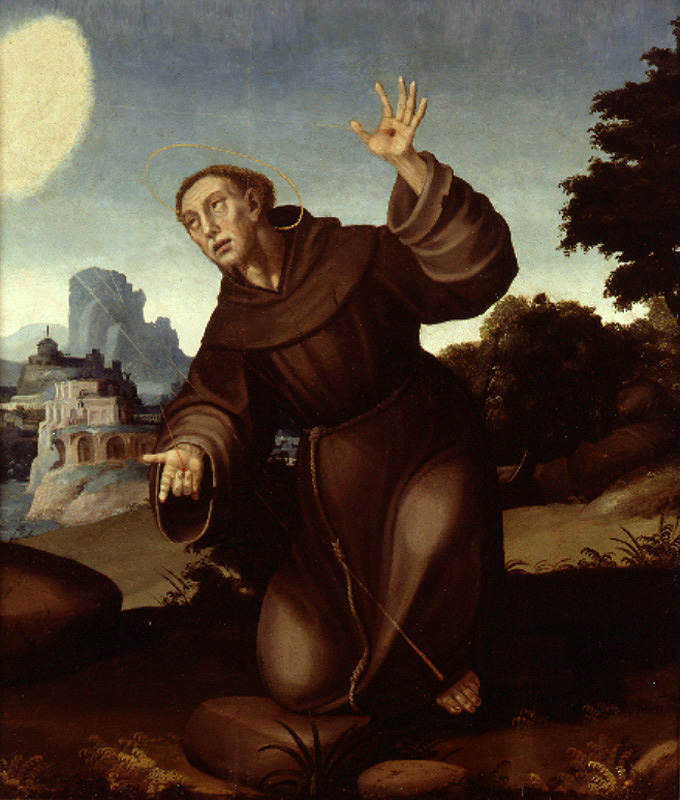 La obra representa a San Francisco de Asís, el fundador de la Orden de los franciscanos, en actitud extática.